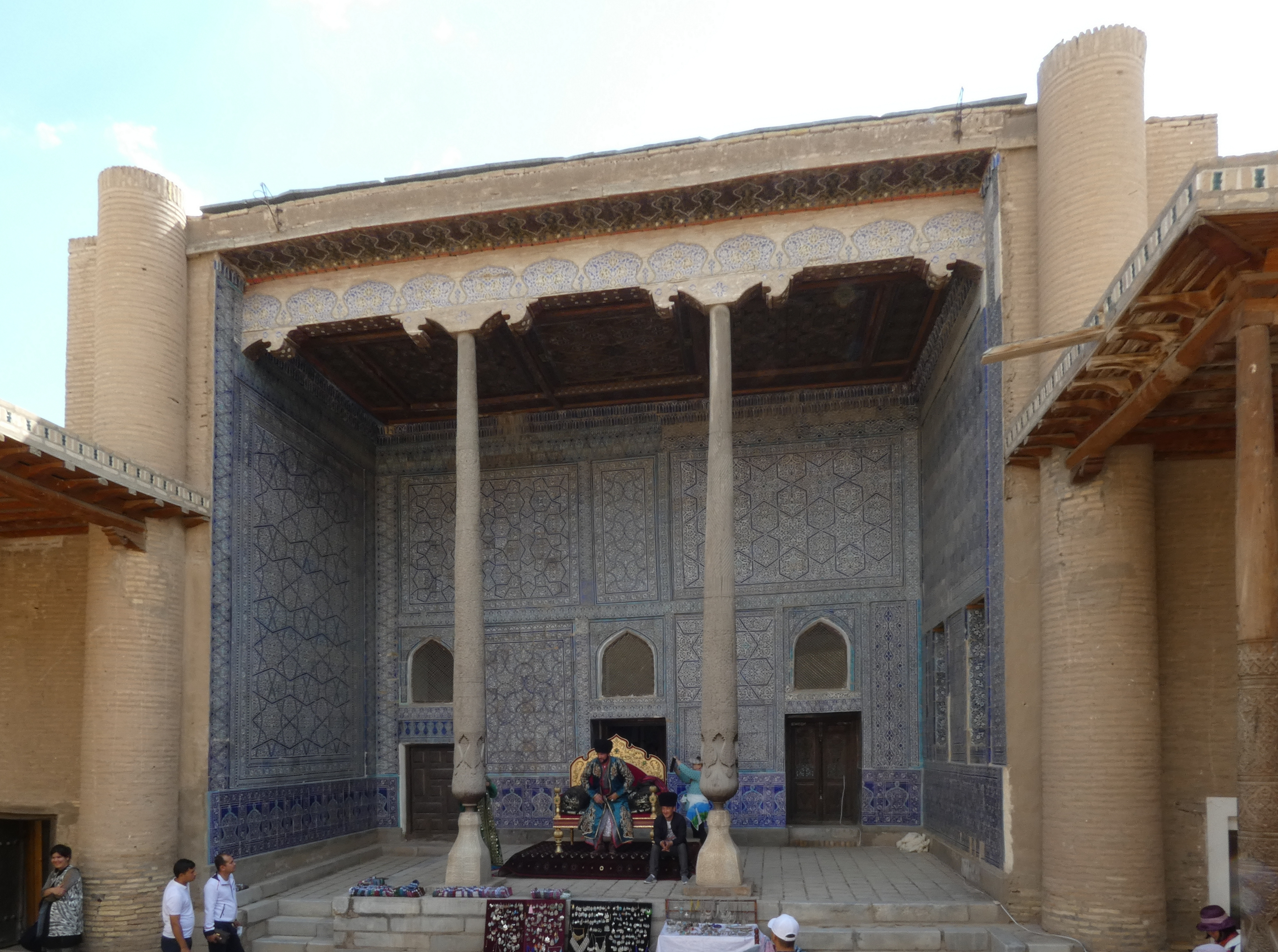 Konya Ark, Chiwa, Iwan des Empfangshofs vor dem Thronsaal